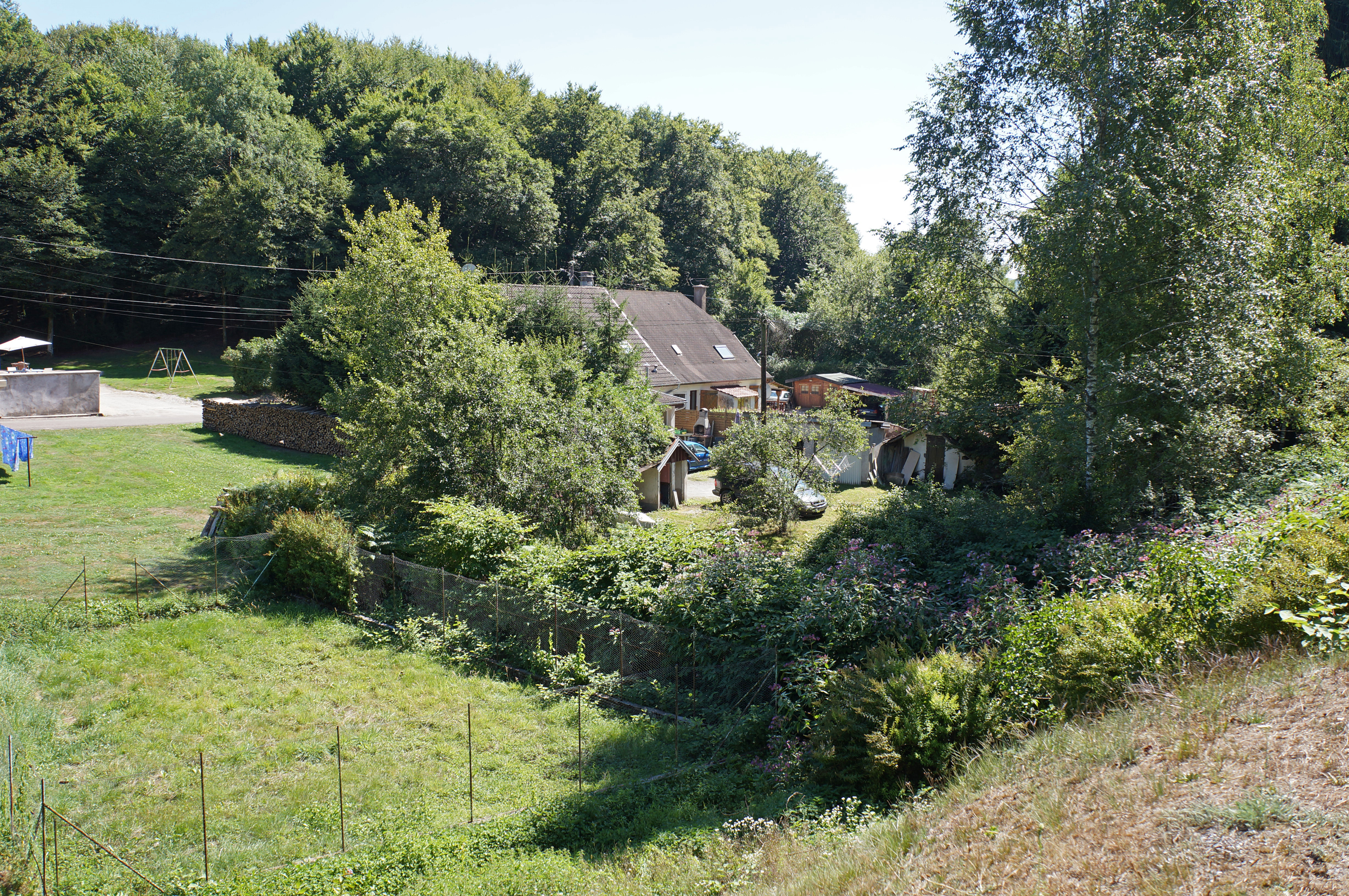 Le hameau de la Houillère (Haute-Saône) : emplacement de l'ancien puits Henri IV.